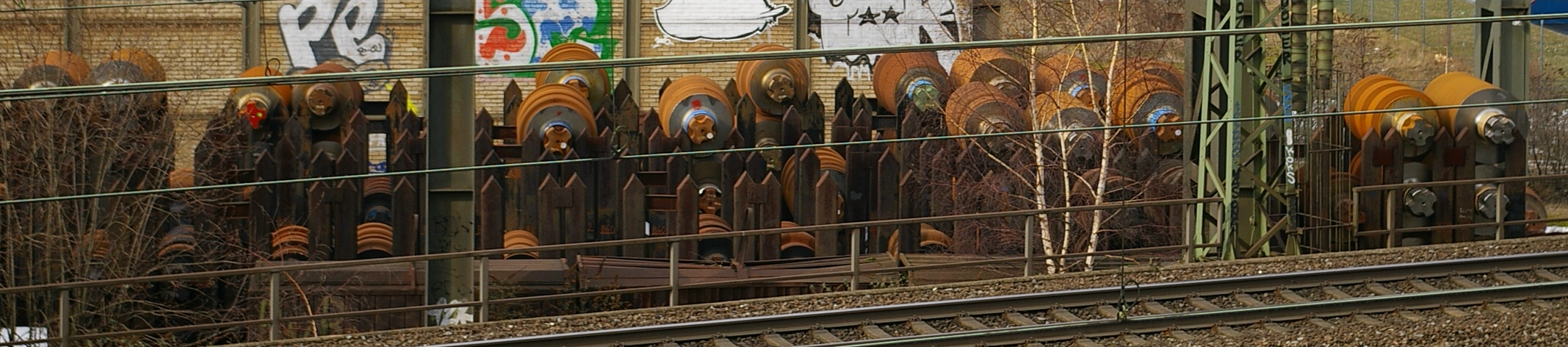 Profilwalzenlager des Hüttenwerks Union, Dortmun. Eigenes Foto, März 2006, GNU-GFDL-Lizenz